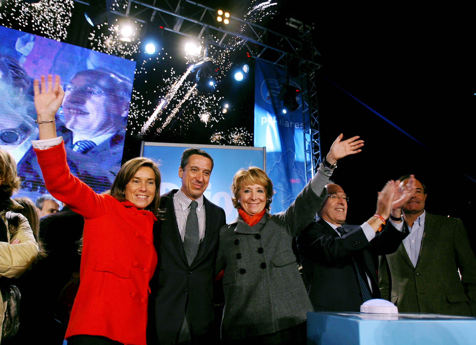 iniciocampaña_07